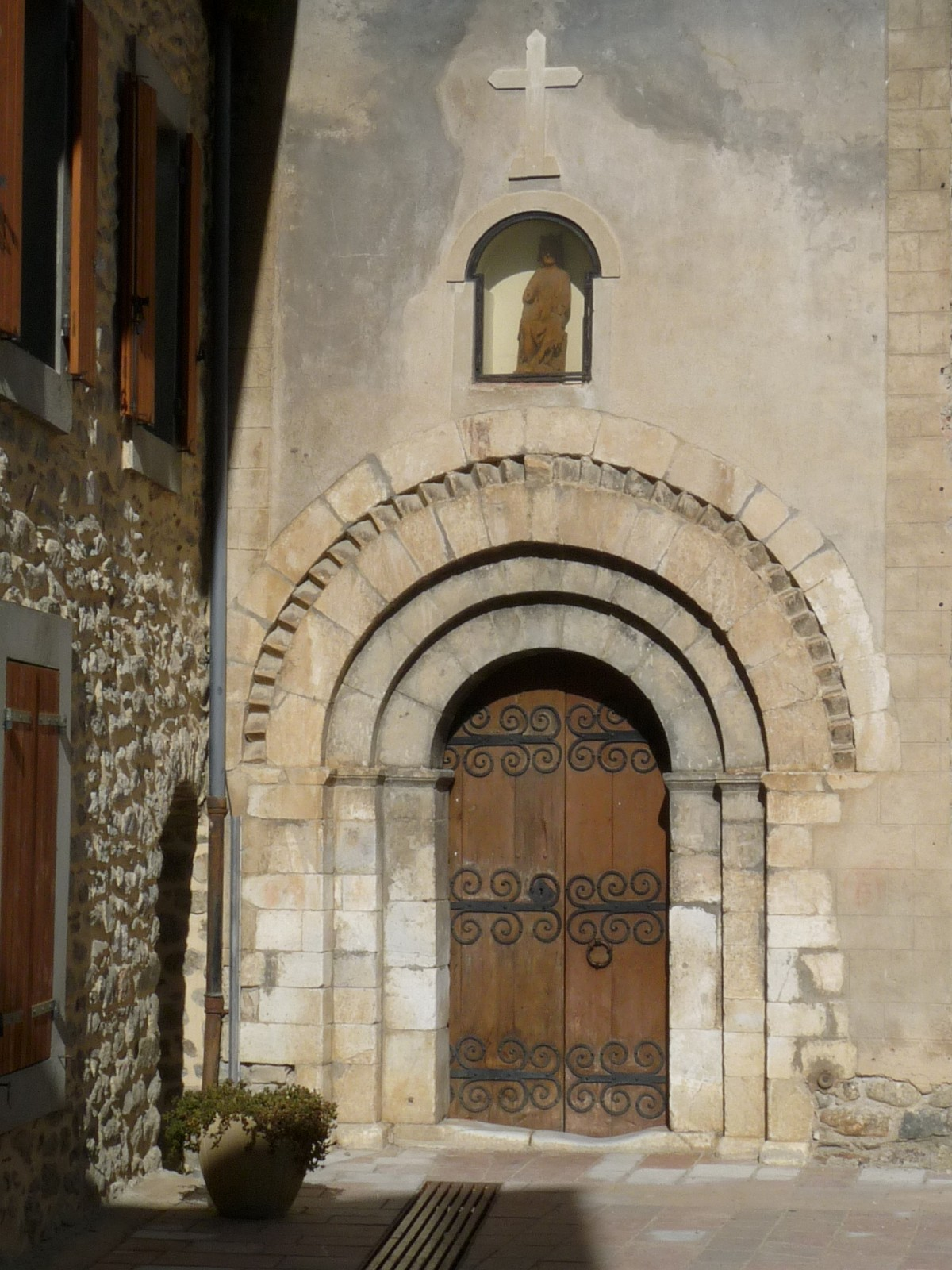 Eglise de Nyer, Pyrénées-Orientales, France